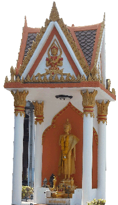 พระพุทธรูปประจำโรงเรียน